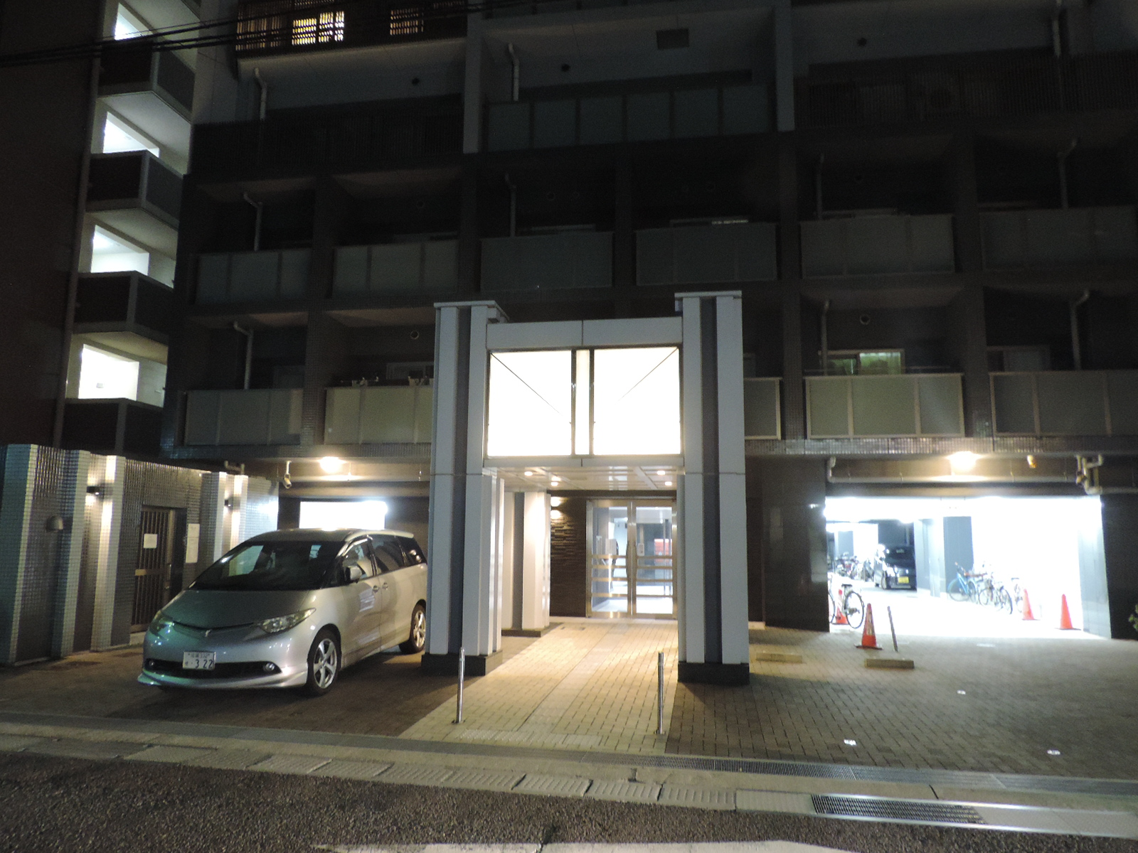 草津シネマハウスの跡地にはマンション「サンシティ草津」が建てられた。2017年撮影